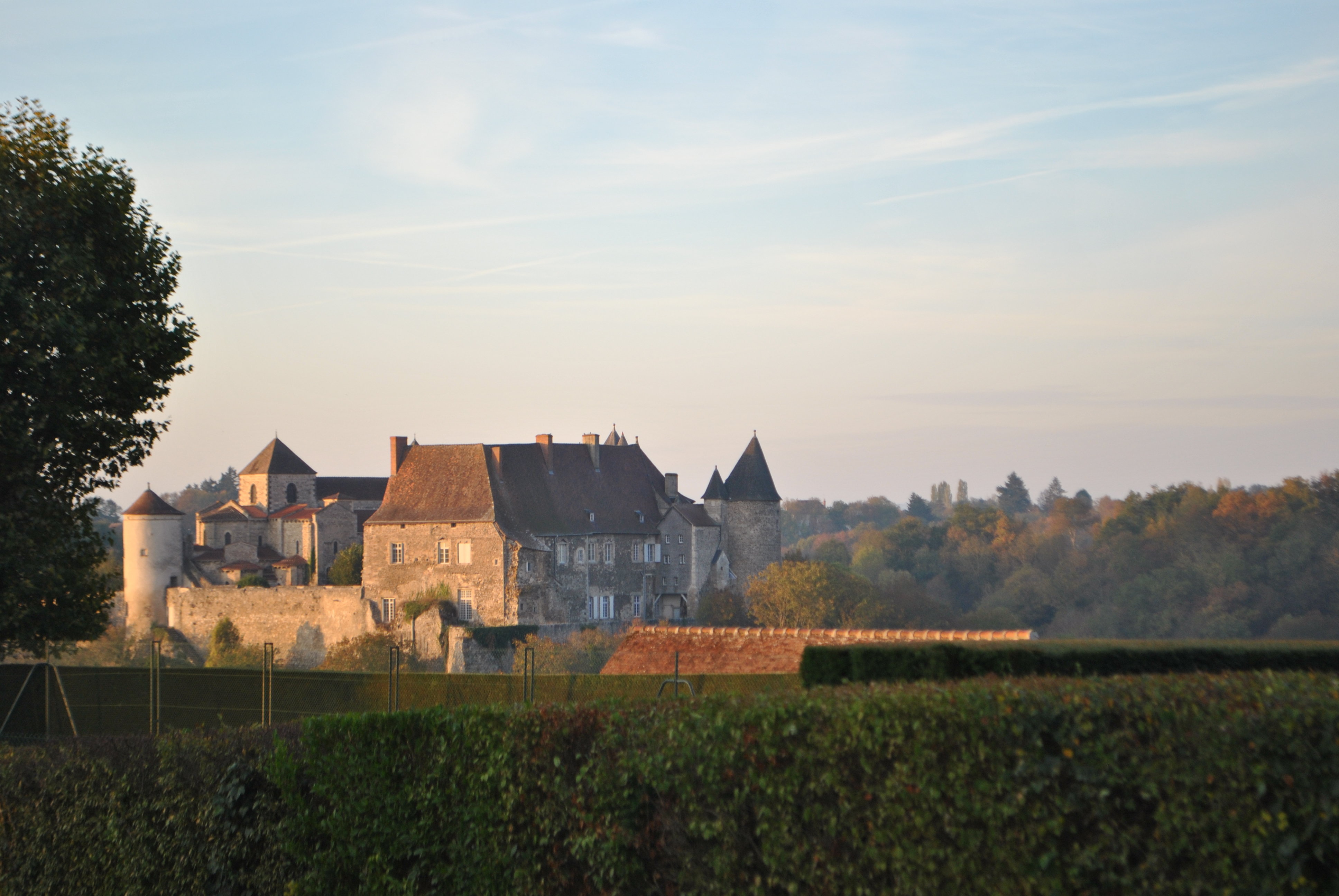 Die Abtei liegt auf einem Felsvorsprung über dem Fluß Bouble